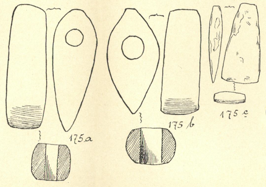 Zwei Äxte und ein Beil aus dem zerstörten Großsteingrab Sallenthin